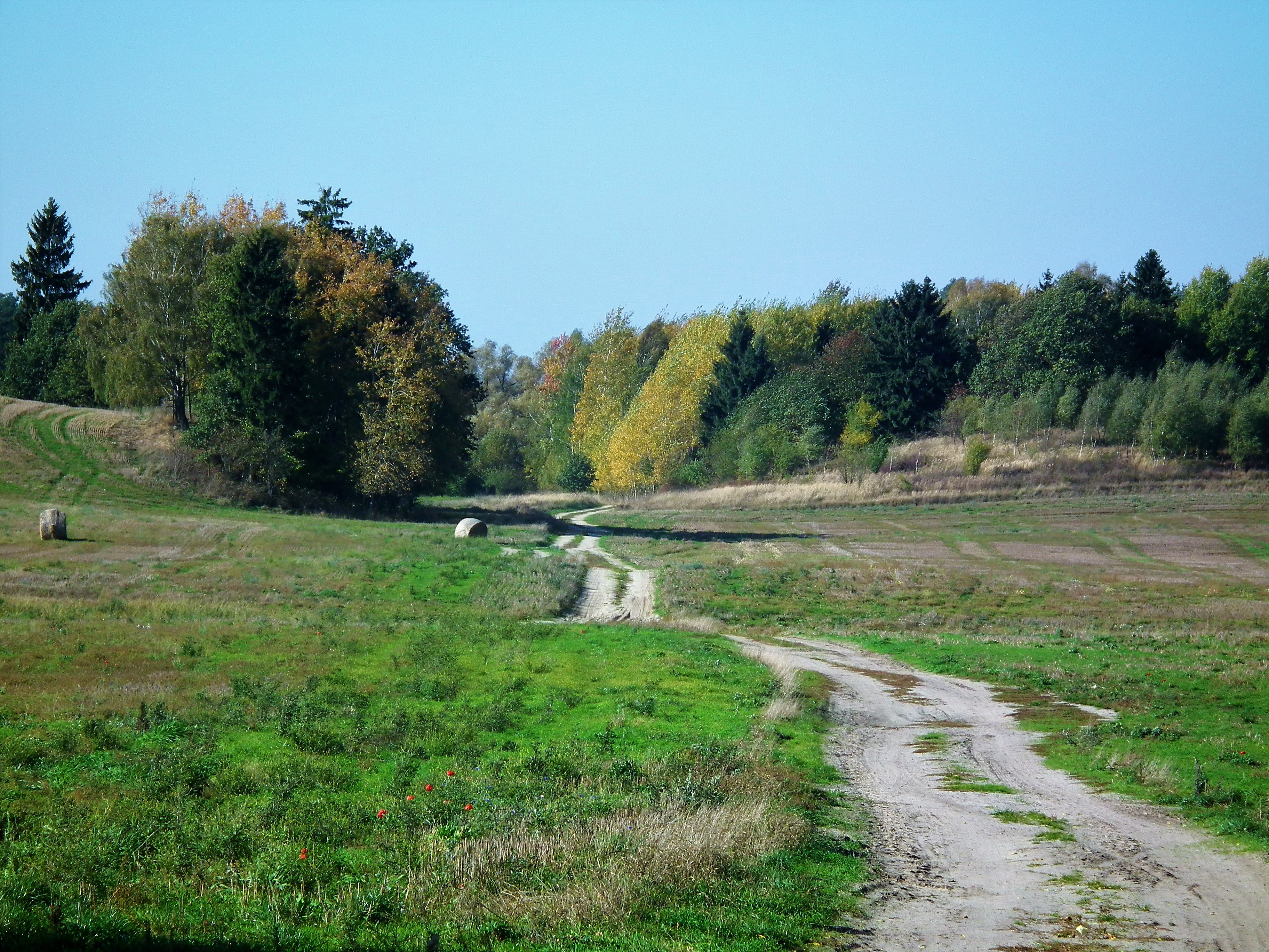 Gmina Chociwel. Okolice Starzyc.